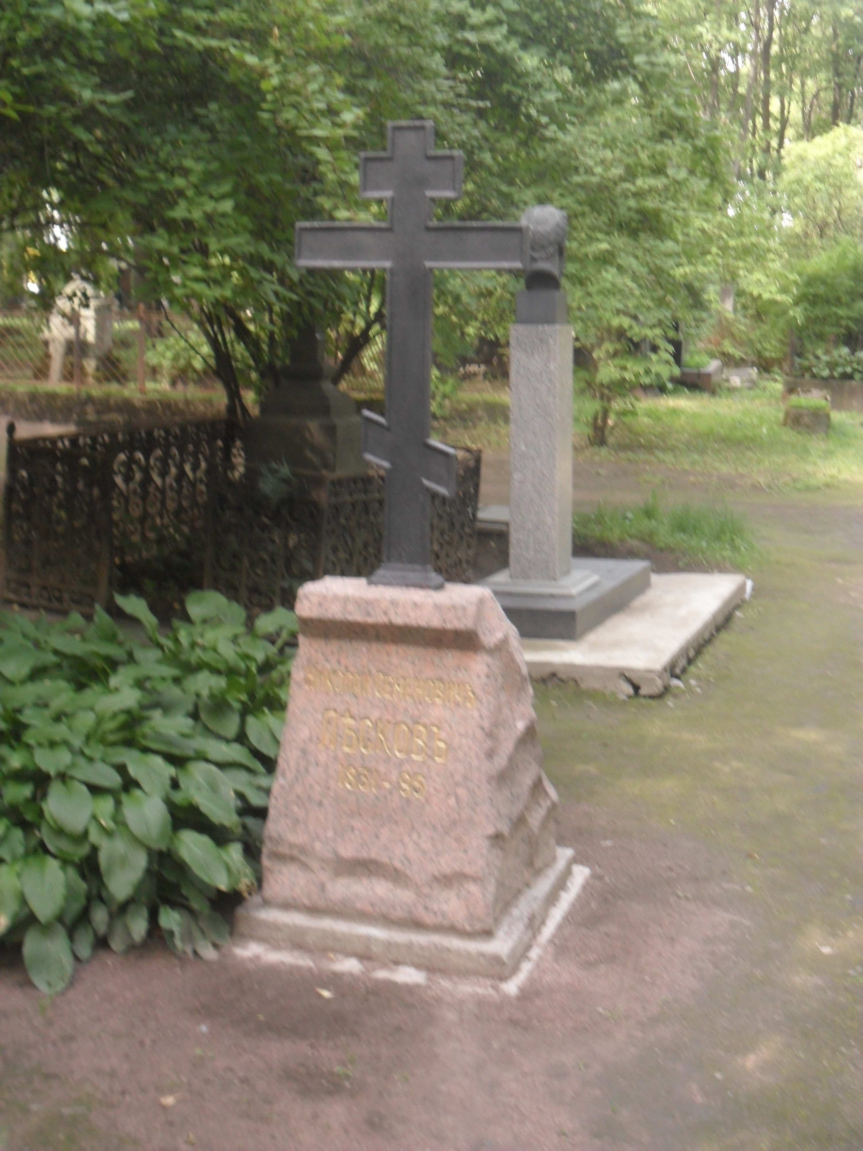 Могила писателя Николая Лескова на Литераторских мостках в Санкт-Петербурге.